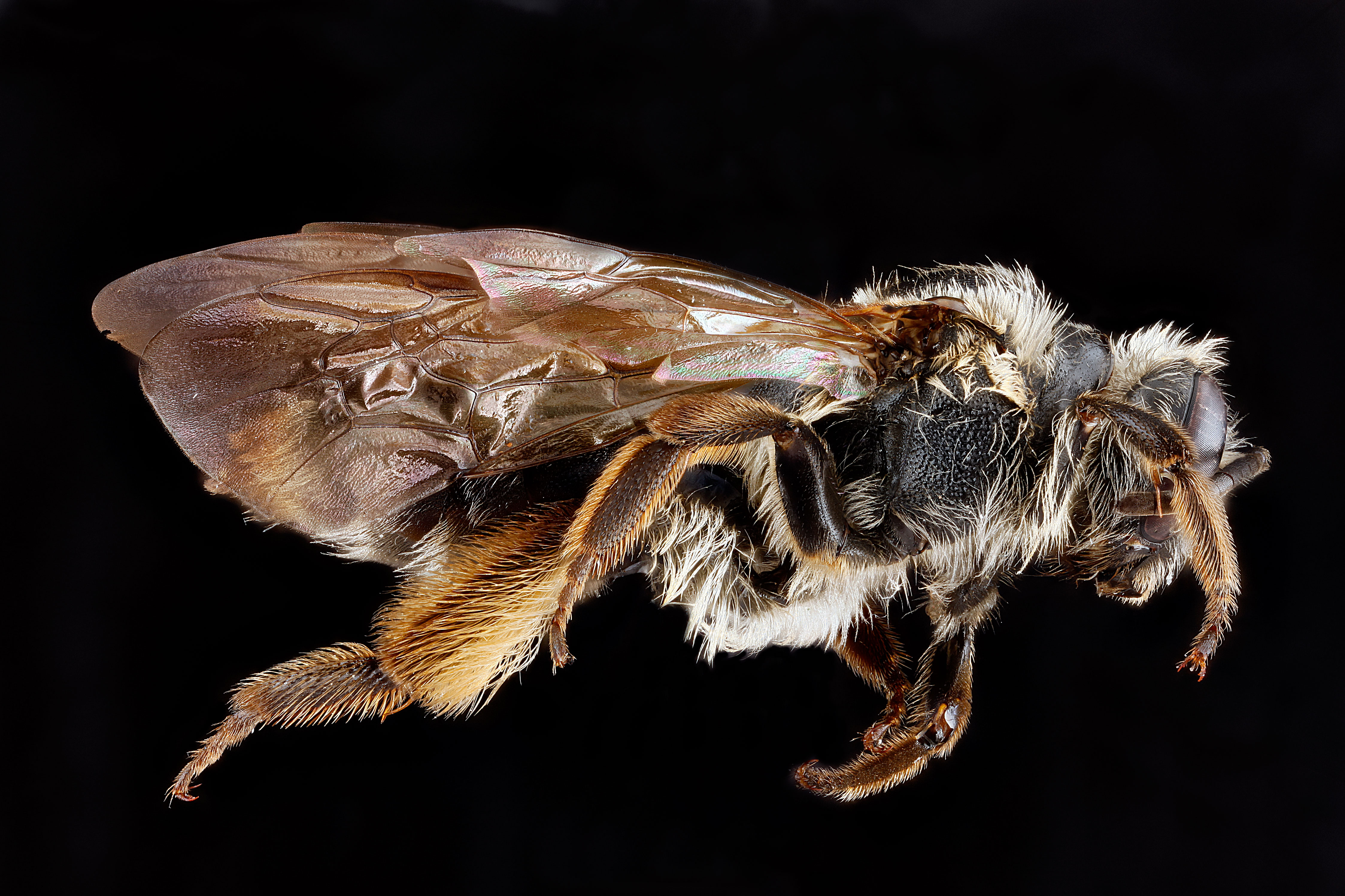 Andrena crataegi, female.